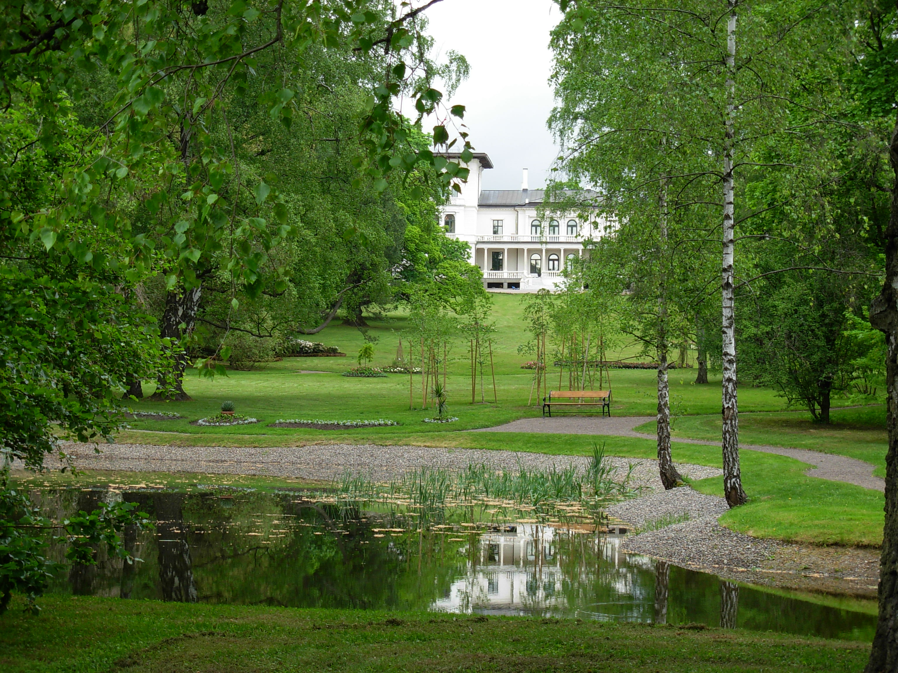 Parken ved Søndre Skøyen gård, Skøyen, Oslo